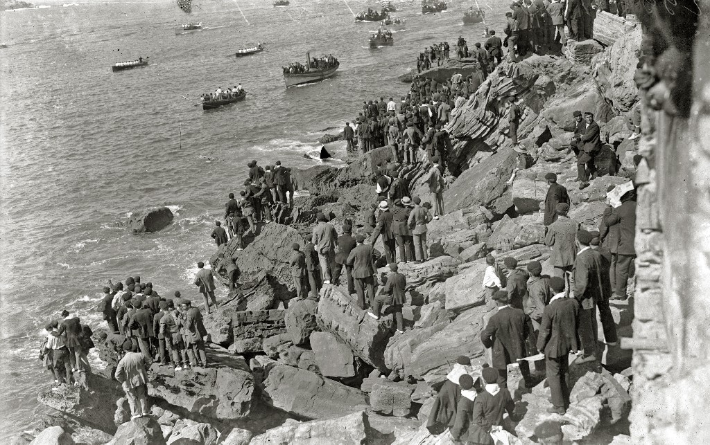 Título original: Regatas de traineras en la bahía de la Concha (74/127) Localización: San Sebastián (Guipúzcoa)